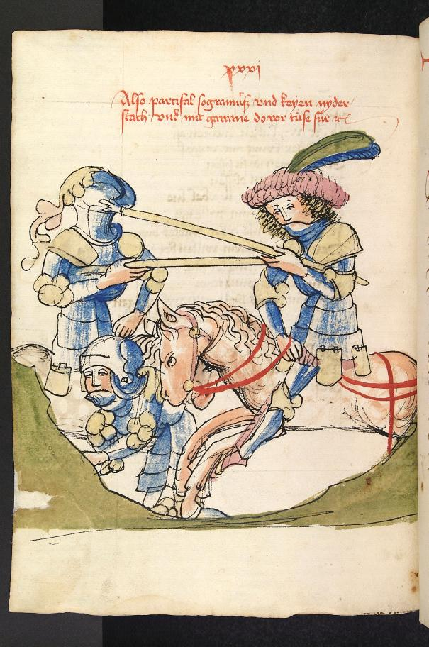 Parzival hat Segramors besiegt und kämpft mit Keye. Aus: Wolfram von Eschenbach, Parzival (Handschrift), Hagenau, Werkstatt Diebold Lauber, um 1443-1446, Cod. Pal. germ. 339, I. Buch, Blatt 208v. Bildtitel: Parzival hat Segramors besiegt und kämpft mit Keye Transkription Bildüberschrift: Also parcifal sogramu(r)ß vnd keyen nyder stach vnd mit gawane do vor tüse fur